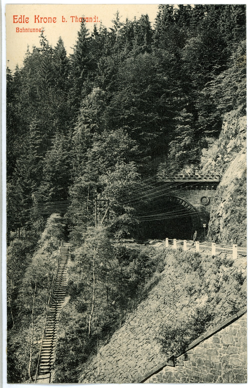 Tharandt; Edle Krone, Bahntunnel This postcard is from publisher Brück & Sohn in Meißen ( postcard has a unique number 04521 and is available in a higher resolution at the publisher. This images was uploaded in a cooperation project between Wikipedians and the publisher.